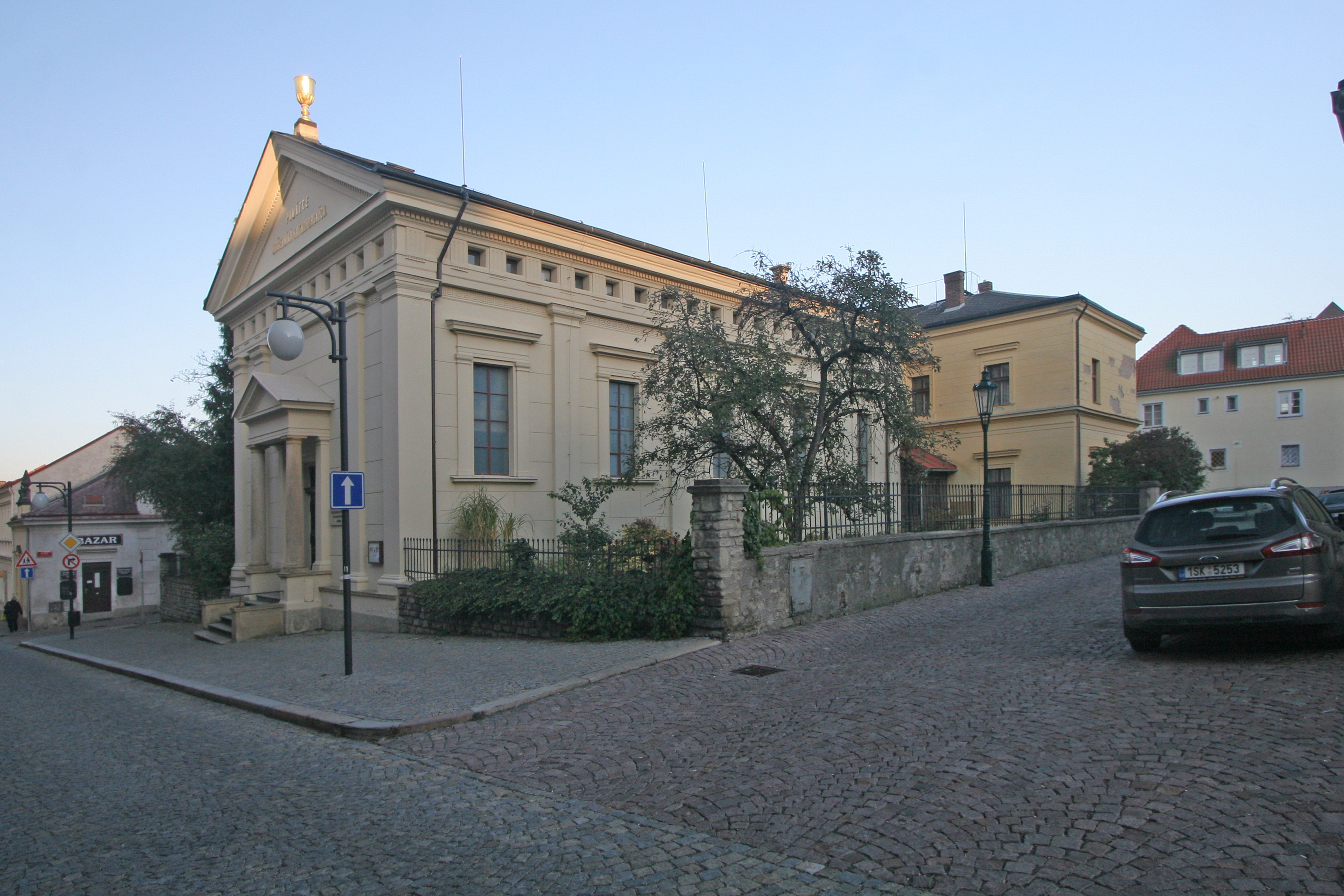 Sbor (Kutná Hora), Jiřího z Poděbrad 308, Kutná Hora